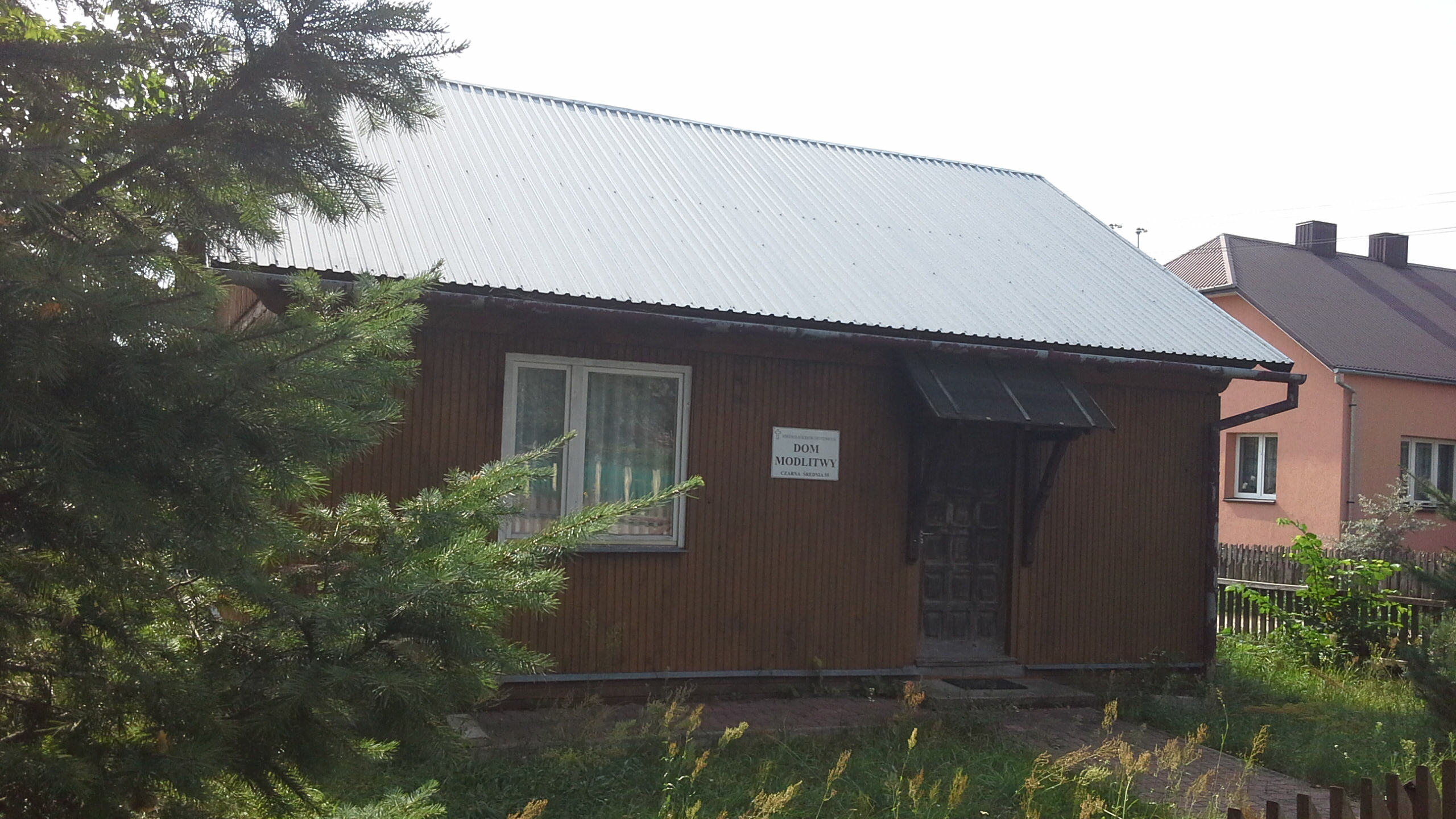 Kościół Chrystusowy - dom modlitwy w Czarnej Średniej